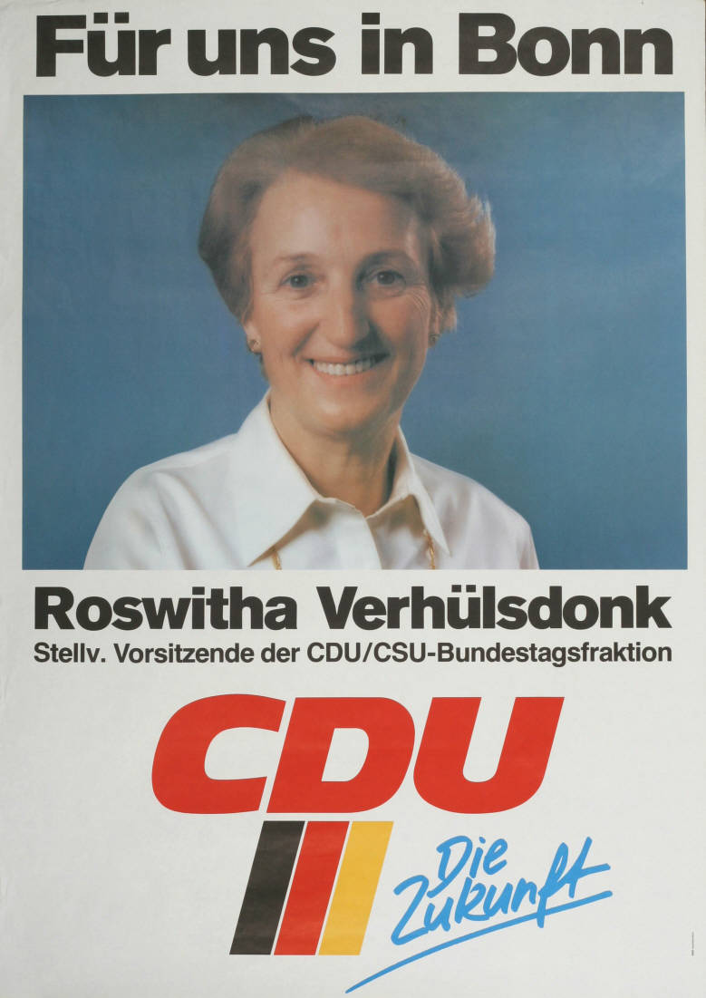 Für uns in Bonn Roswitha Verhülsdonk Stellv. Vorsitzende der CDU/CSU-Bundestagsfraktion CDU Die Zukunft Abbildung: Porträtfoto Plakatart: Kandidaten-/Personenplakat mit Porträt Objekt-Signatur: 10-001: 2933 Bestand: Plakate zu Bundestagswahlen (10-001) GliederungBestand10-18: Plakate zu Bundestagswahlen (10-001) » Die 11. Bundestagswahl am 25. Januar 1987 » CDU » Mit Porträtfoto Lizenz: KAS/ACDP 10-001: 2933 CC-BY-SA 3.0 DE